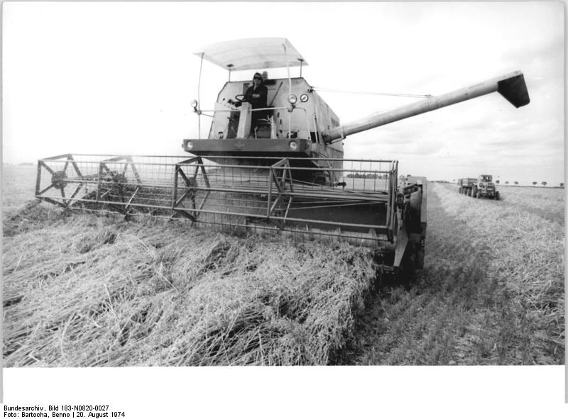 KAP Bartow, Haferernte ADN-ZB Bartocha 20.8.74-wa-Bez. Neubrandenburg: Lagergetreide erschwert auch in der KAP Bartow im Kreis Altentreptow die Erntearbeiten. Hier wird ein Haferschlag geräumt.